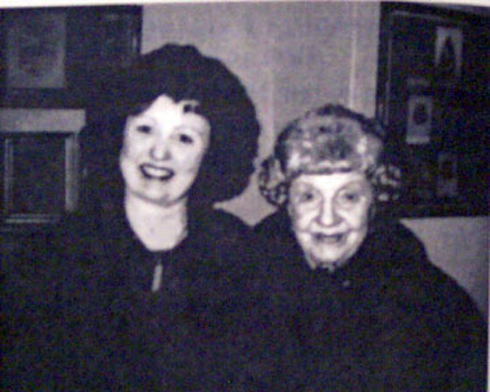 Peggy Willis-Aarnio and Natalia Dudinskaya 1998